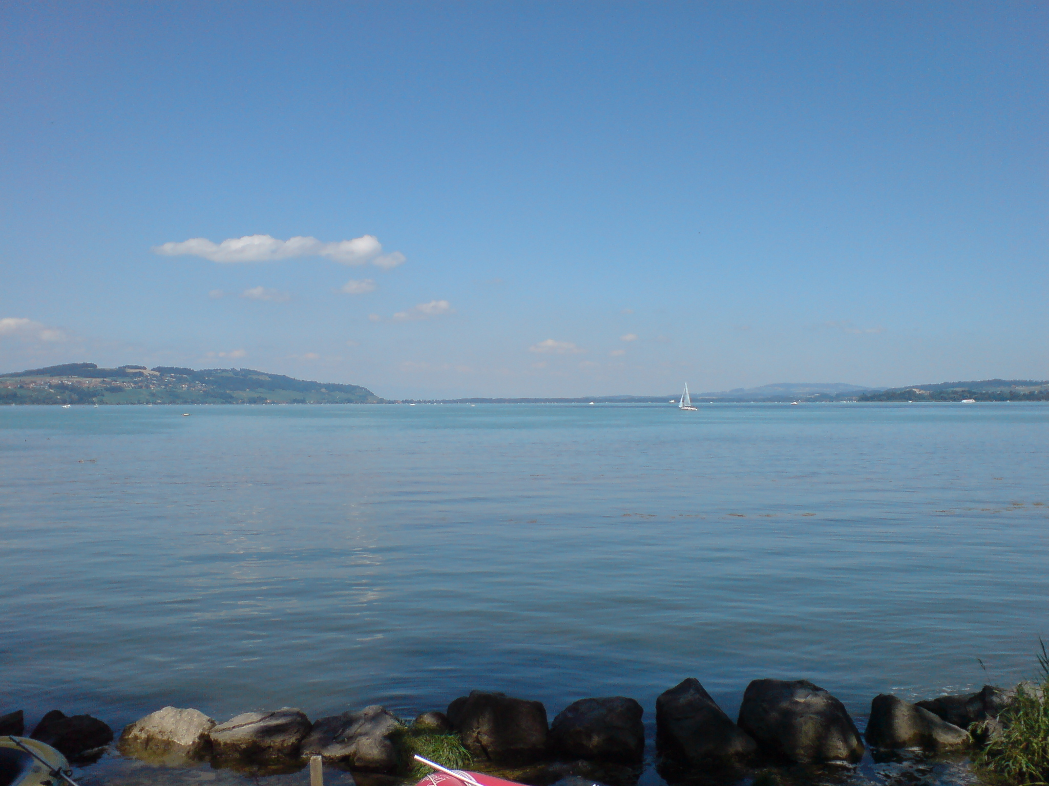 Il s'agit de Lac de Morat pris en photo en été.